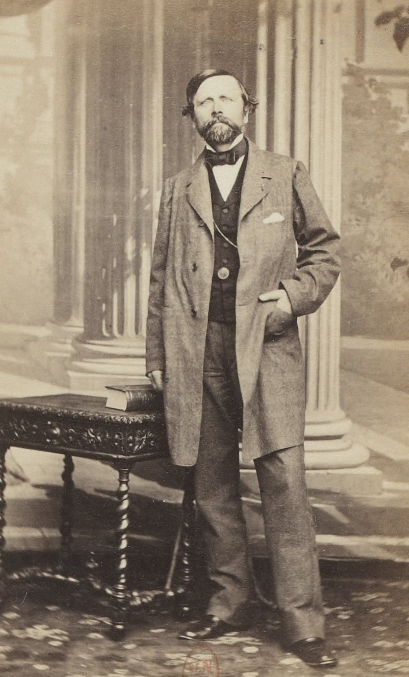 Album des députés au Corps législatif entre 1852-1857.